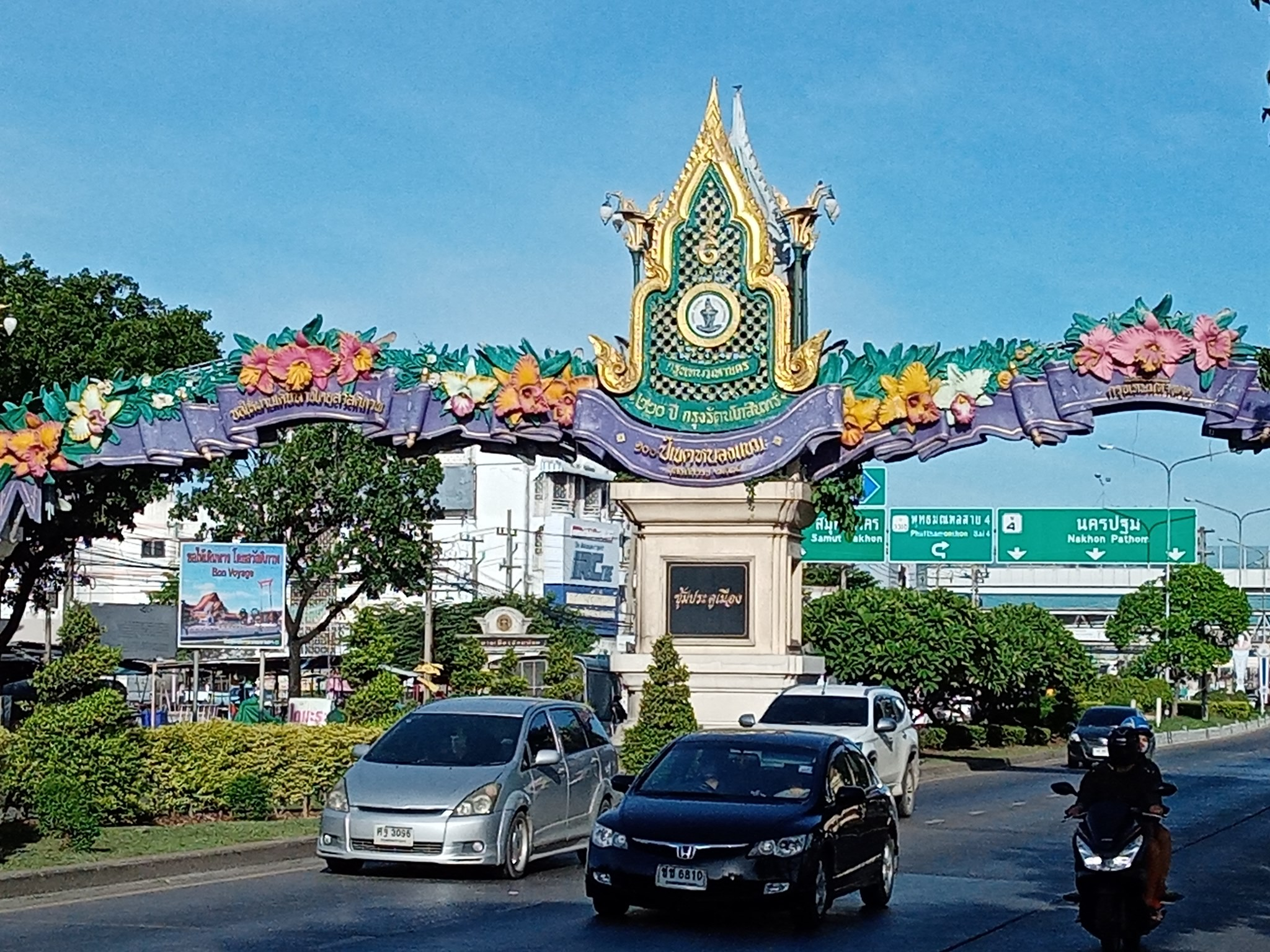 ซุ้มประตูเข้าสู่เขตหนองแขม บน ถ.เพชรเกษม